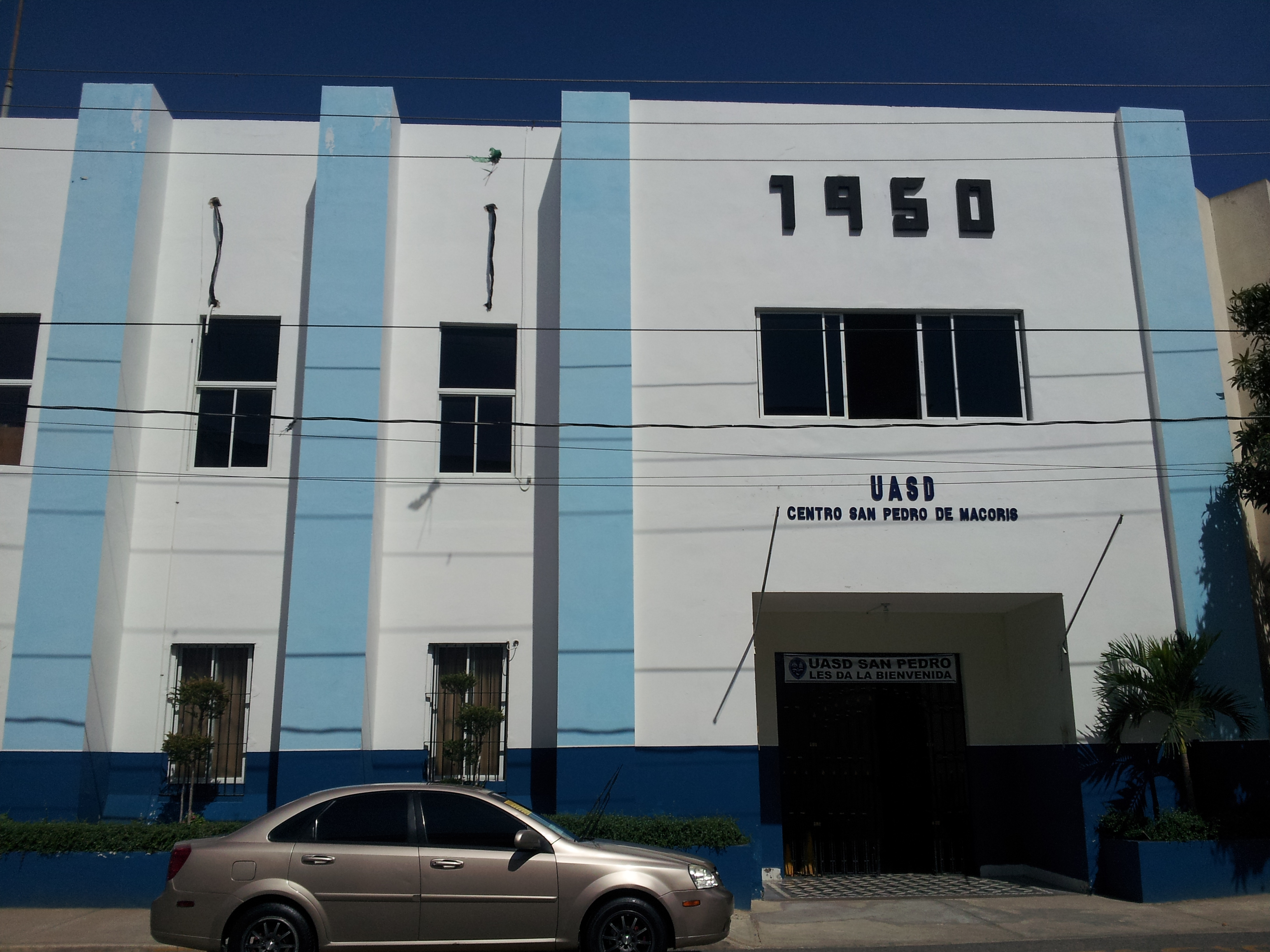 UASD SAN PEDRO